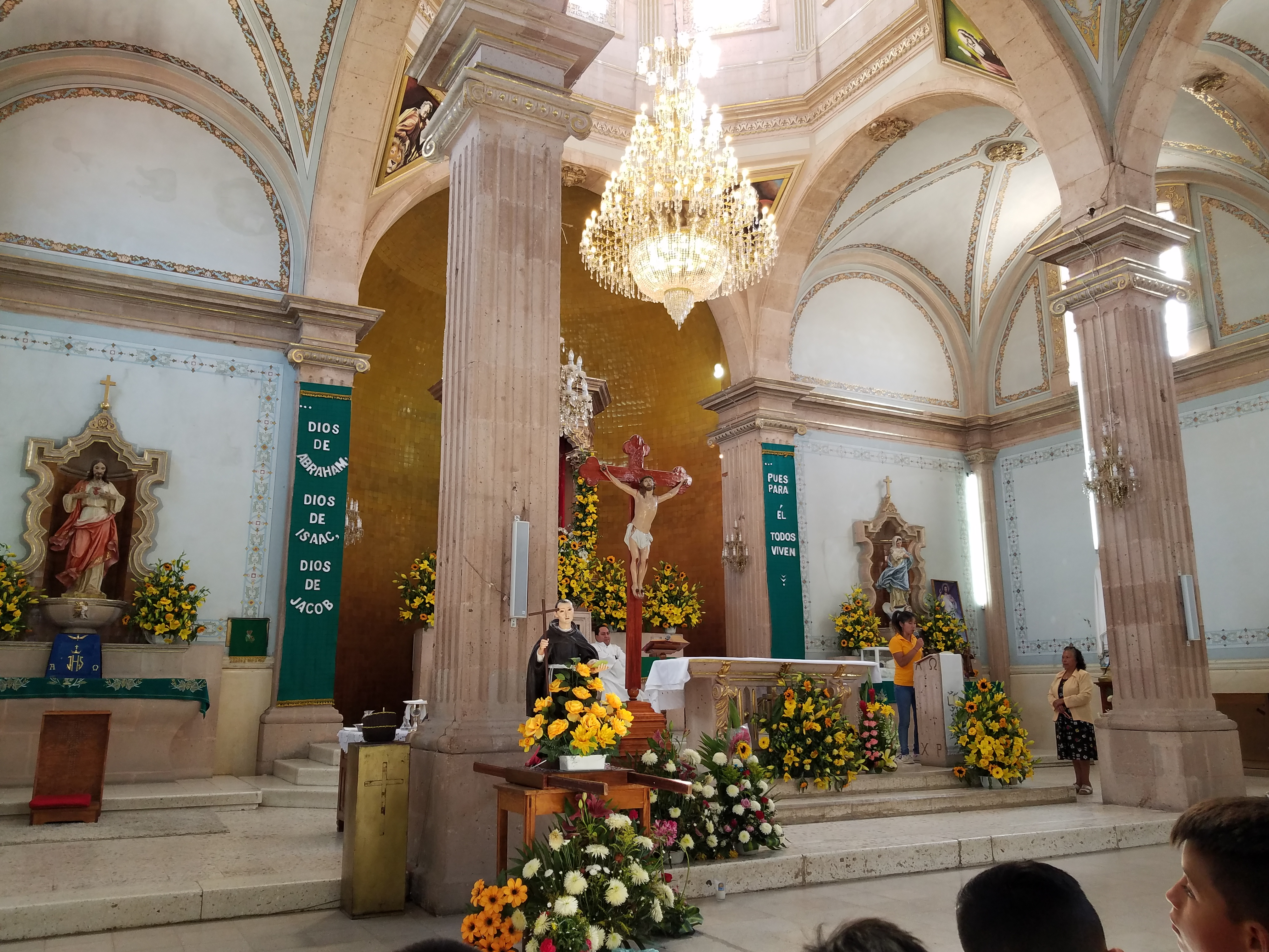 Interior de la Parroquia de San Diego de Alcala